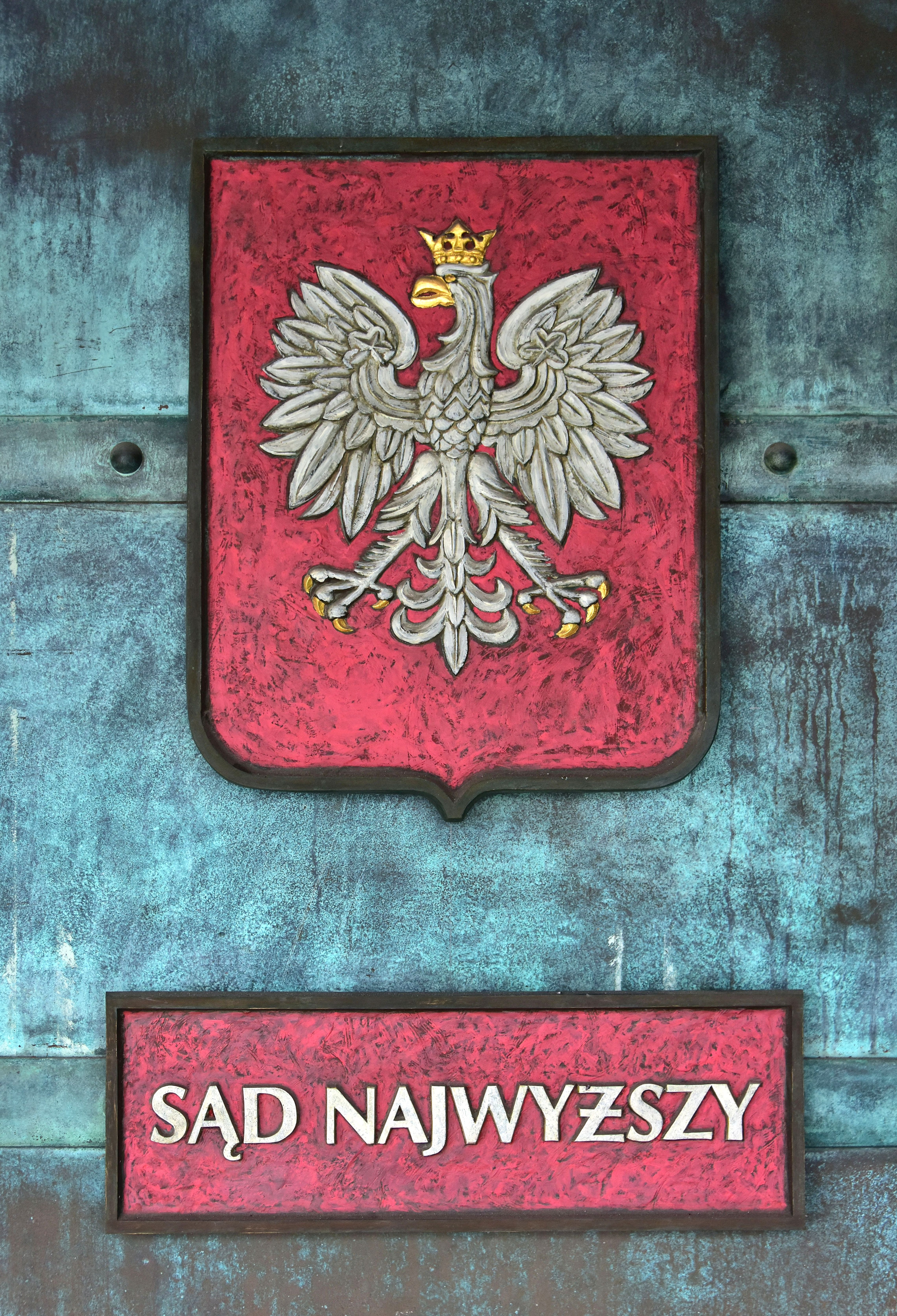 Tablice przy wejściu do gmachu Sądu Najwyższego w Warszawie